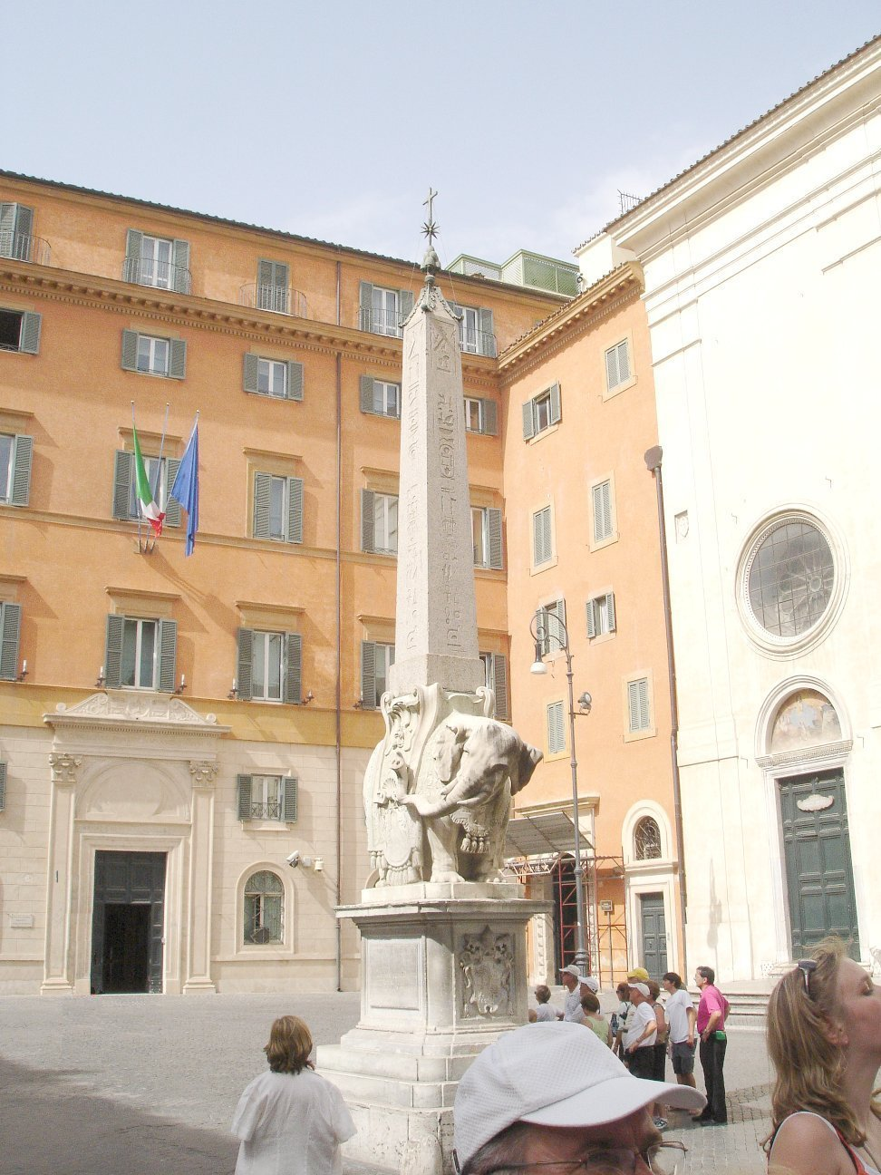 Obelisk Minerveo on Piazza di Minerva in Rome.